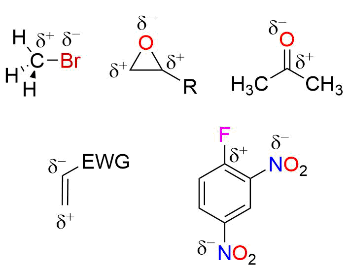 Esimerkkejä elektrofiilisistä hiiliyhdisteistä. Elektrofiilisillä hiiliatomeilla on osittainen positiivinen osittaisvaraus, jota merkitään δ+:lla.